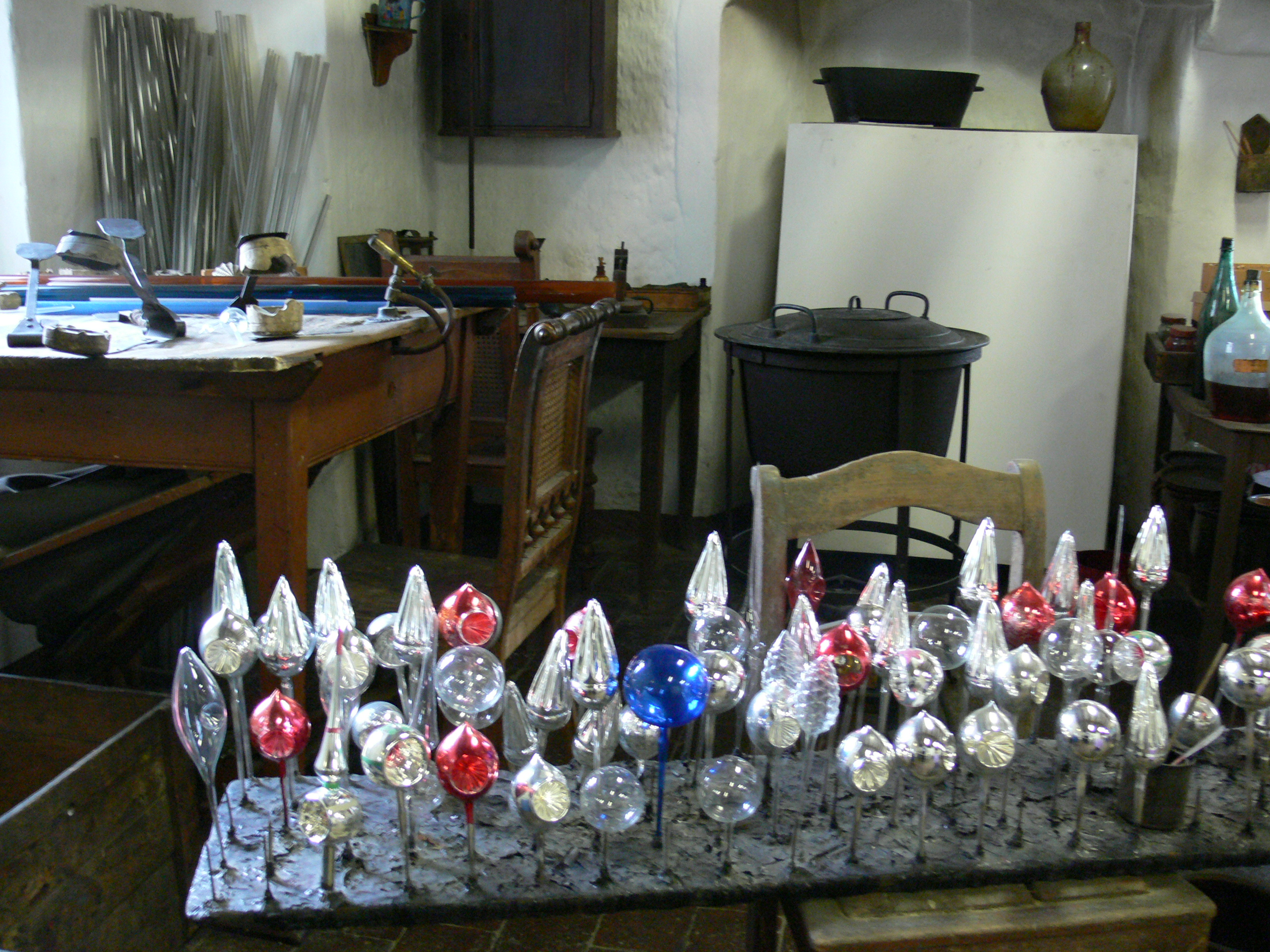 Wohn- und Arbeitsstube einer Glasbläserfamilie, Lauscha, um 1930. Museum für Thüringer Volkskunde, Erfurt